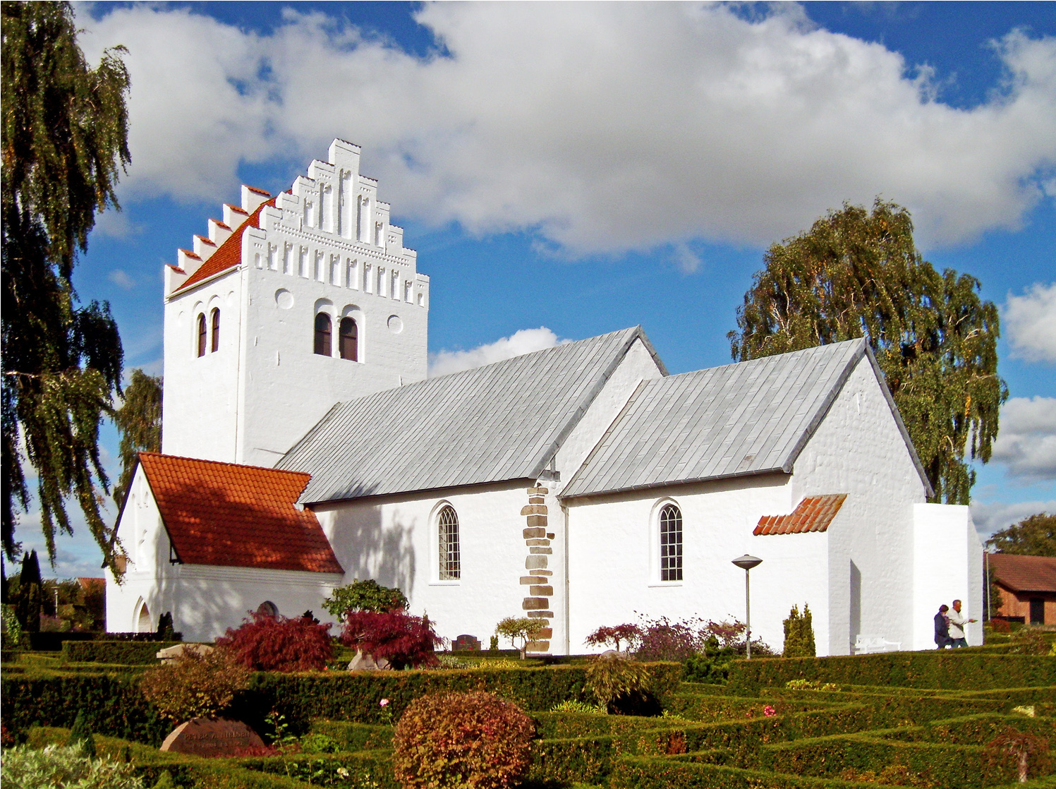 fra sydøst